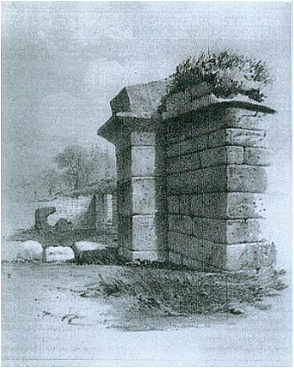 Osttor des Kastell Banna (Birdoswald) kurz nach seiner Freilegung um 1855.